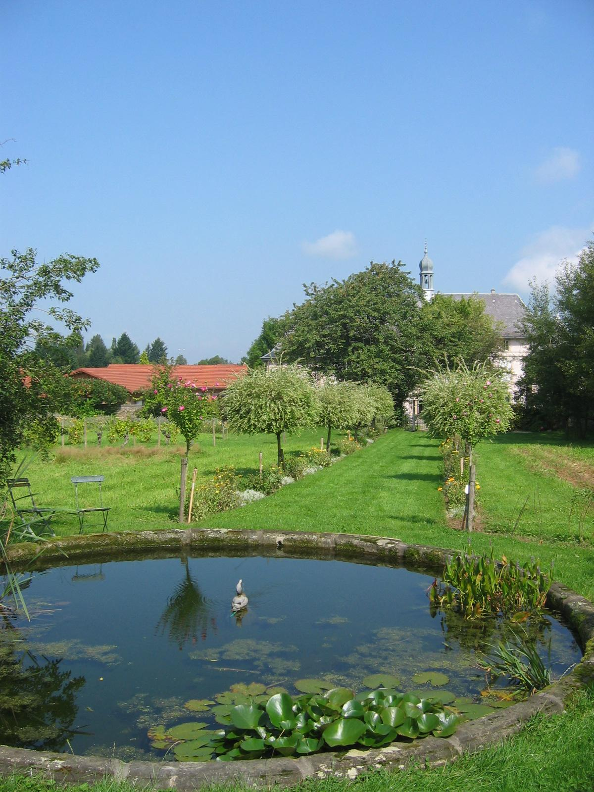 Le parc du Château de Failloux, Epinal/Jeuxey (France)